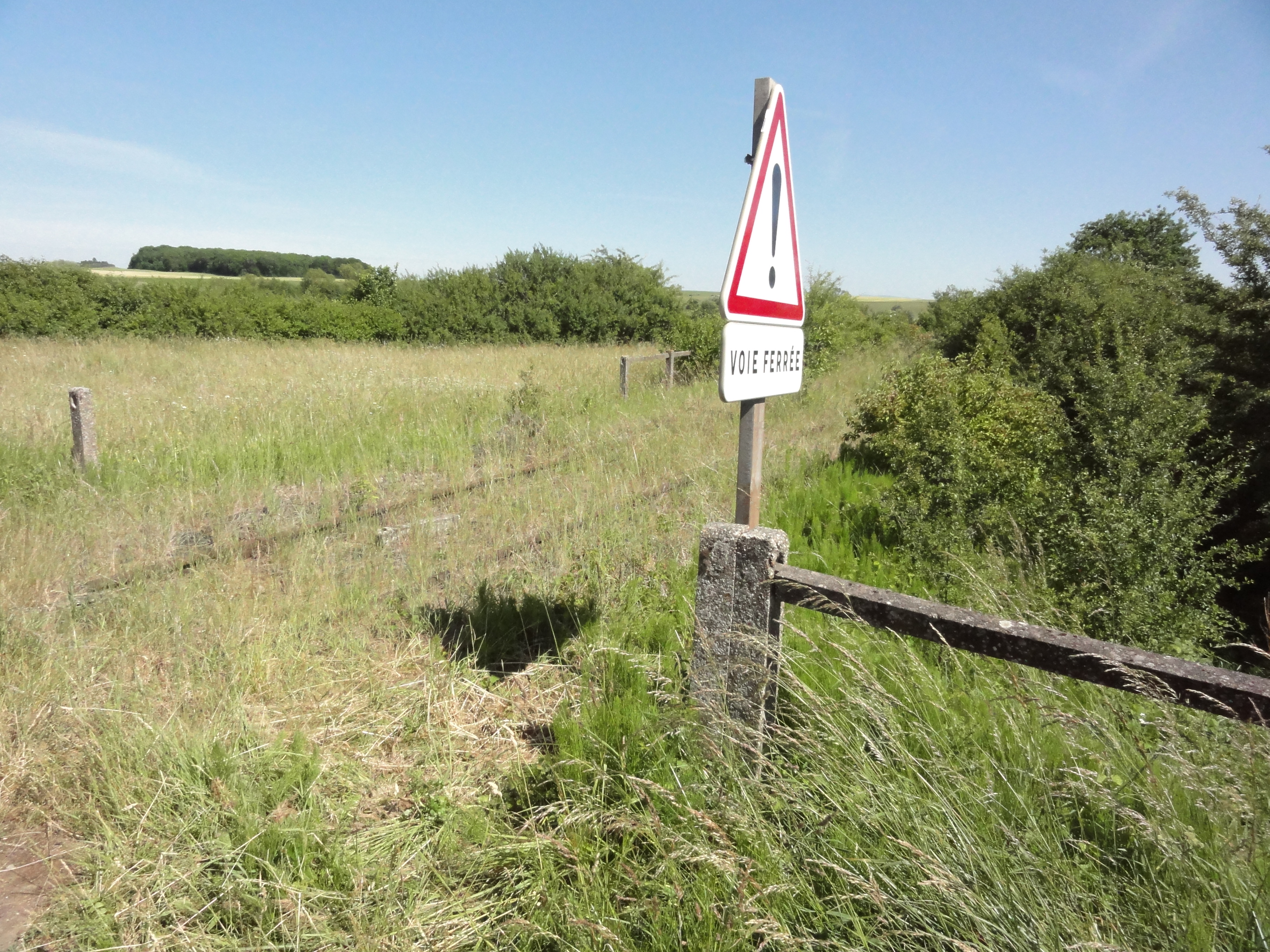 Guébling (Moselle) ancien chemin de fer